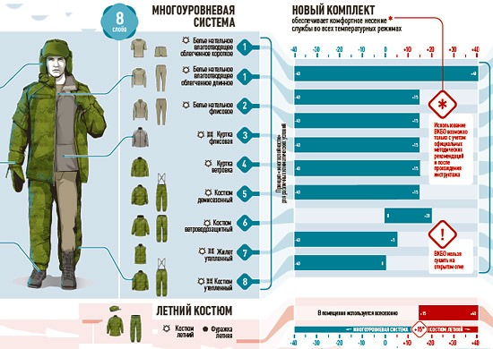 Всесезонный комплект базового обмундирования (ВКБО) военнослужащего Вооруженных Сил России (2013)